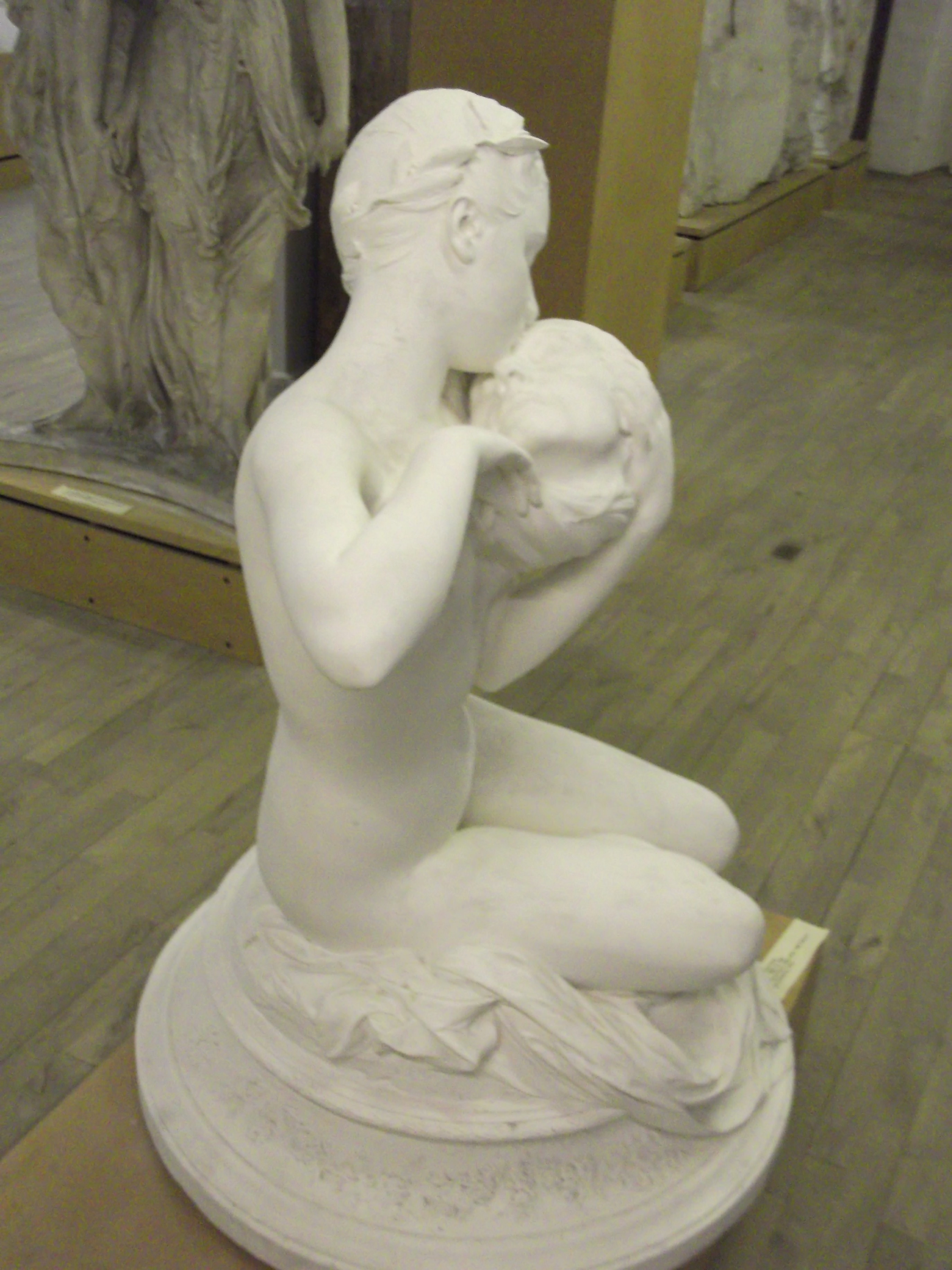 Denys Pierre Puech: André Cheniers muse